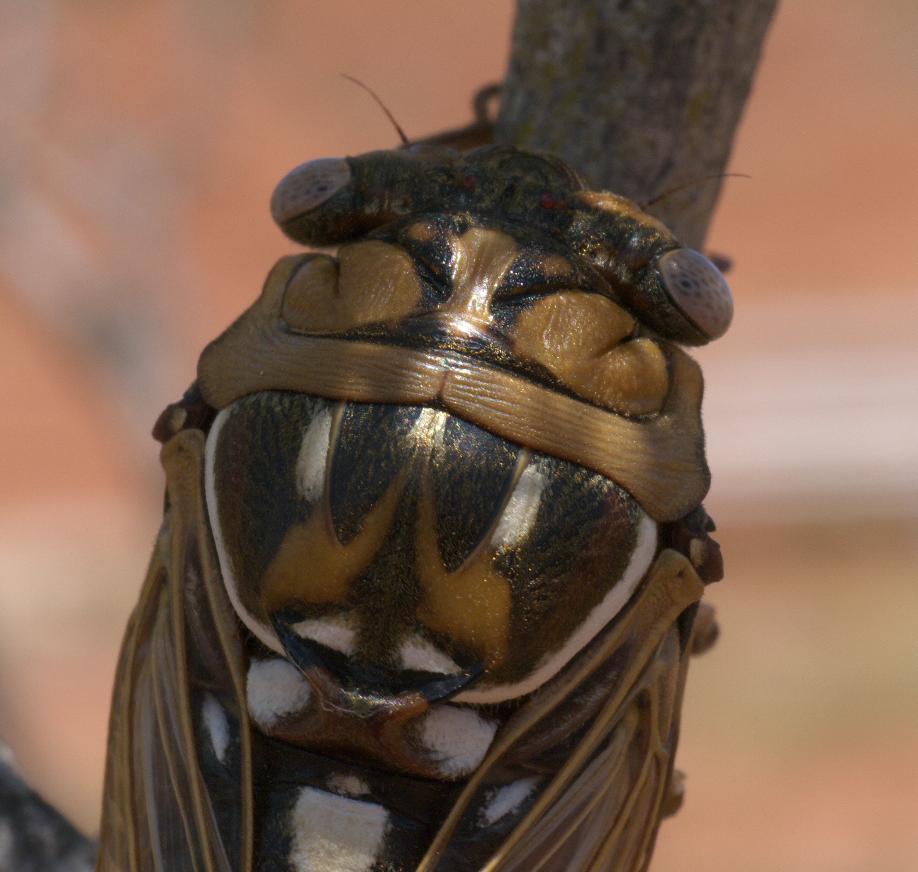 Megatibicen dorsatus, Bush Cicada, ID Confidence: 98